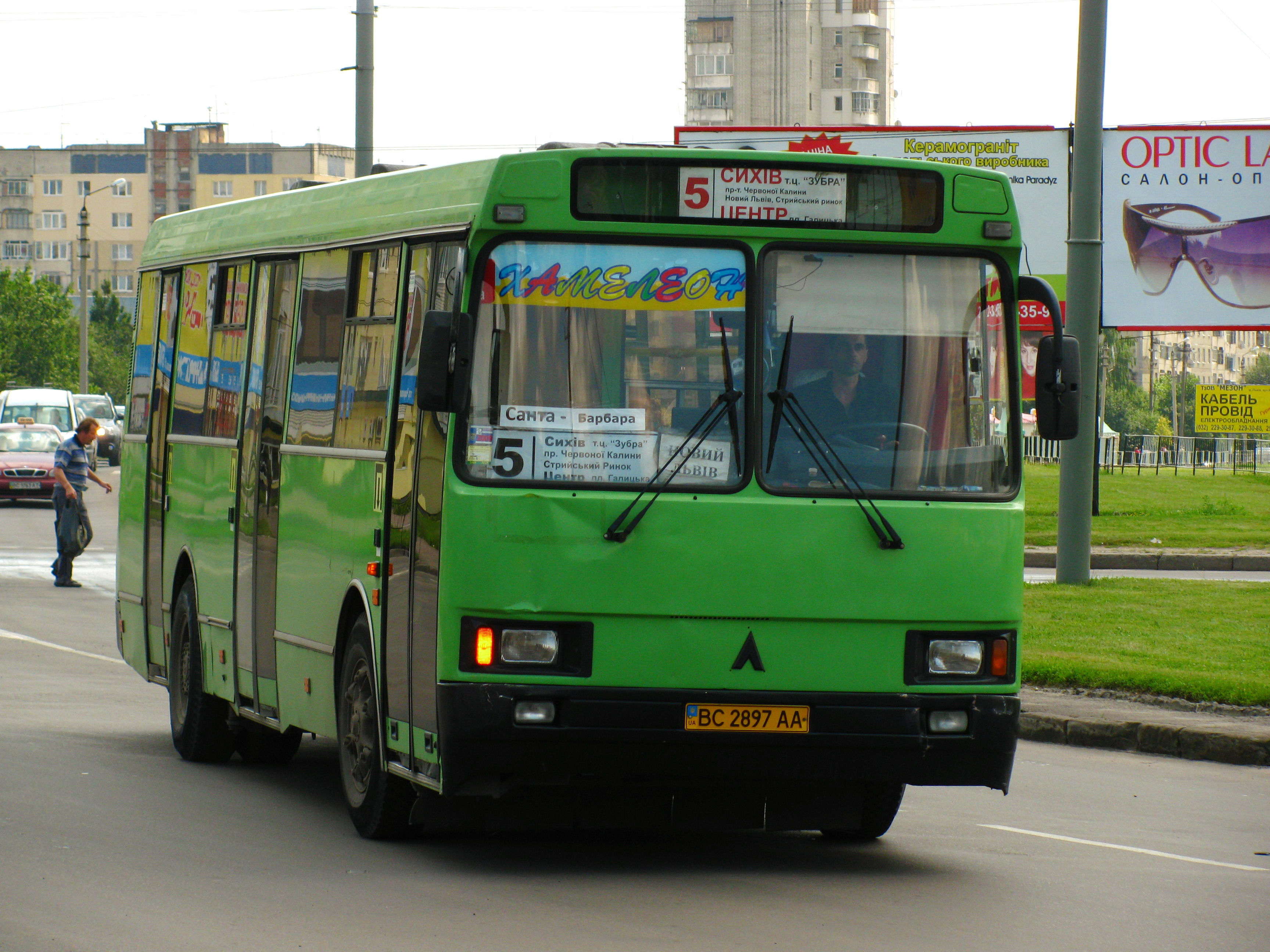 LAZ-5252 на маршруті № 5 на проспекті Червоної Калини у Львові.